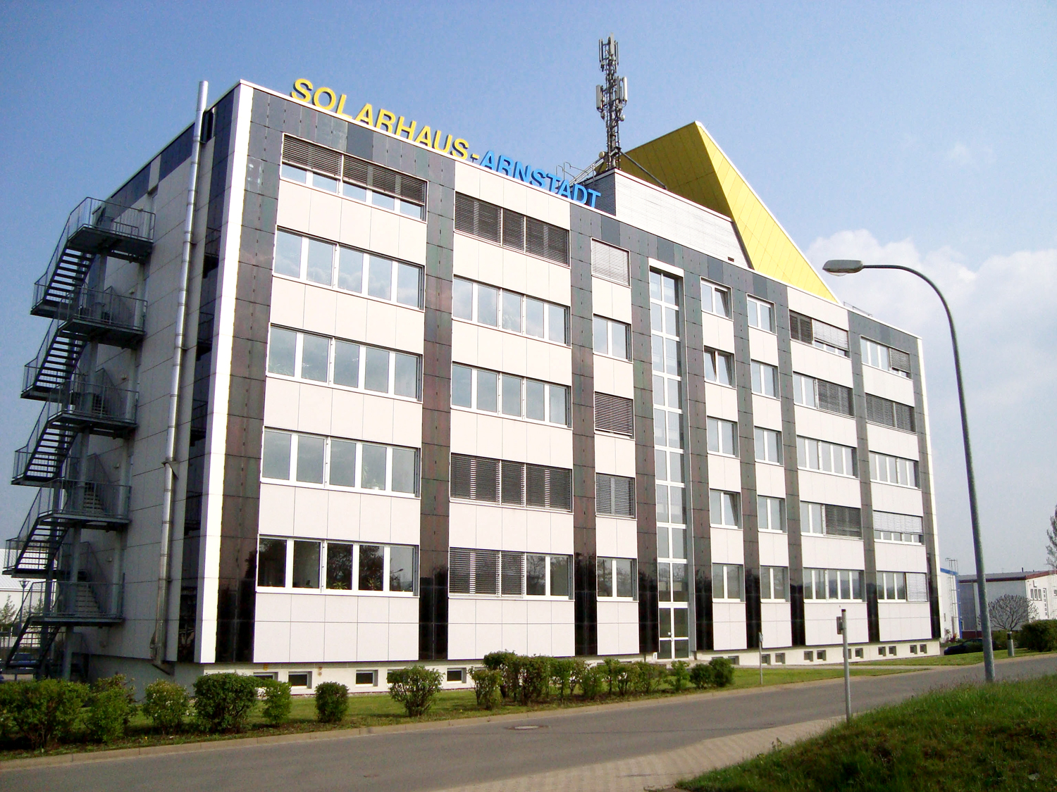 Headquarters in Arnstadt